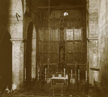 Altar del Monestir de Sant Joan de les Abadesses. Rafael Degollada i Castanys (Entre 1912 i 1924)